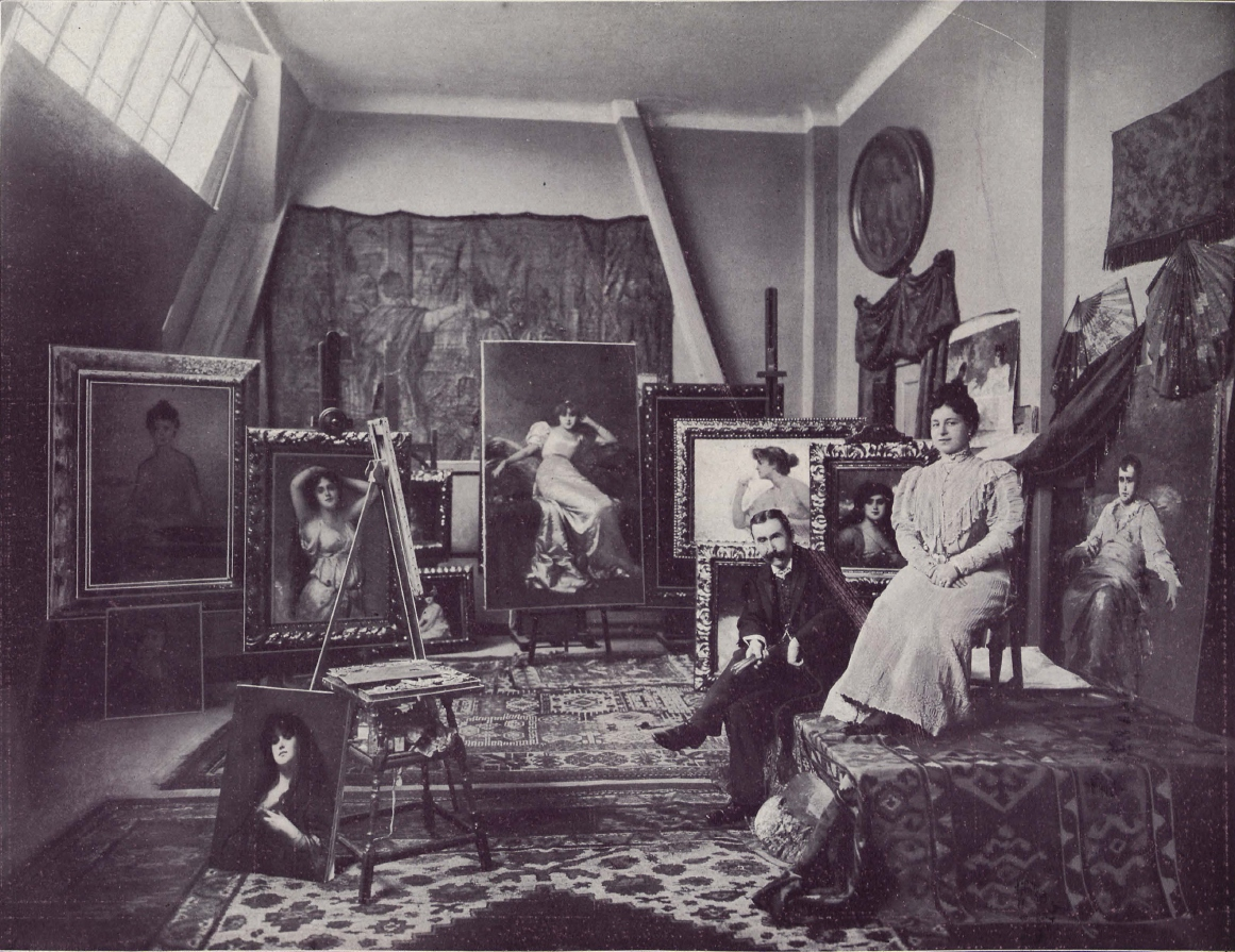 Nathaniel Sichel (1843-1907), deutscher Maler und Buchillustrator.